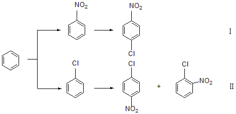 间硝基氯苯的合成路线